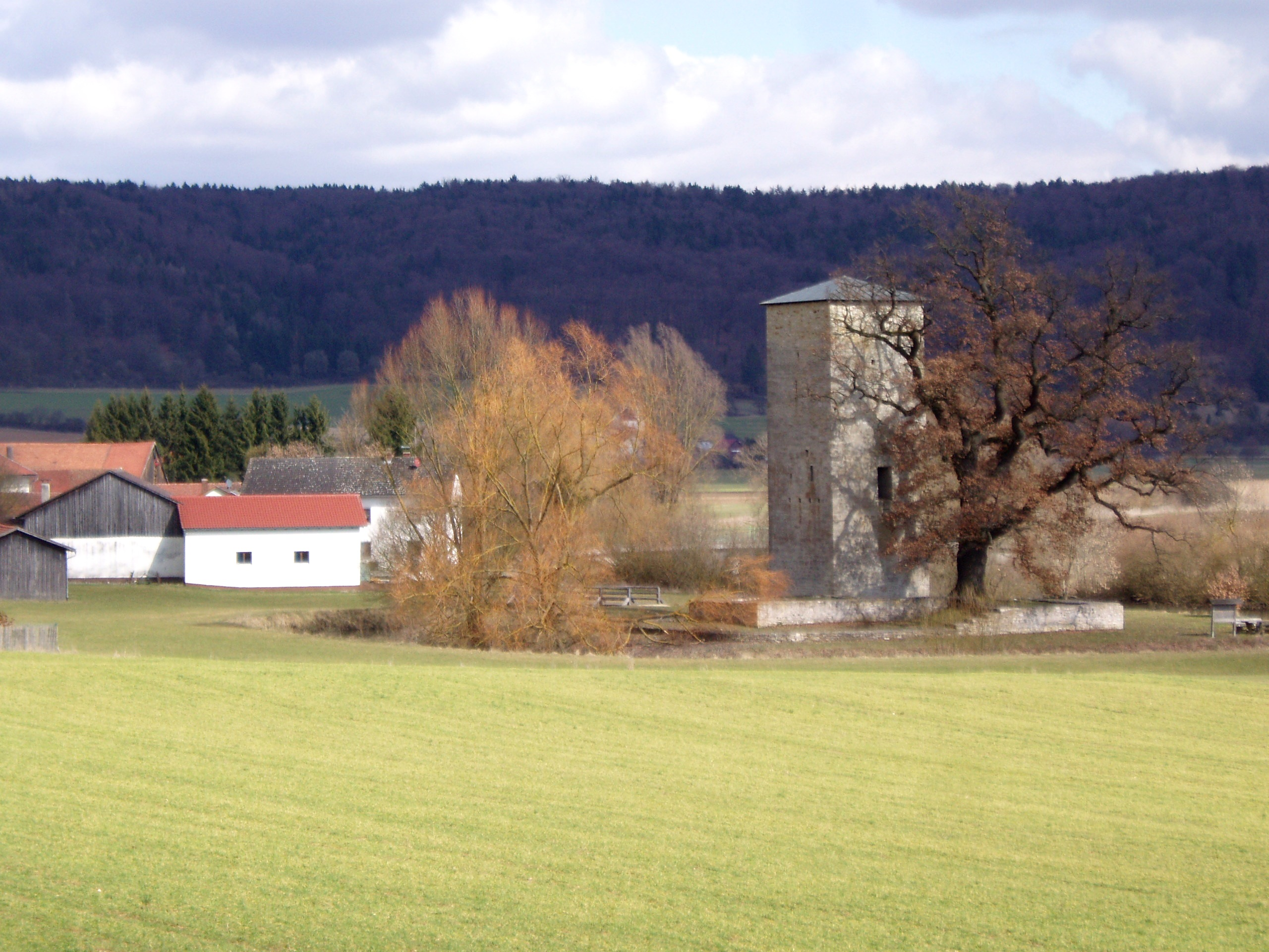 Rieshofen_im_Altmühltal,_Wasserschloss